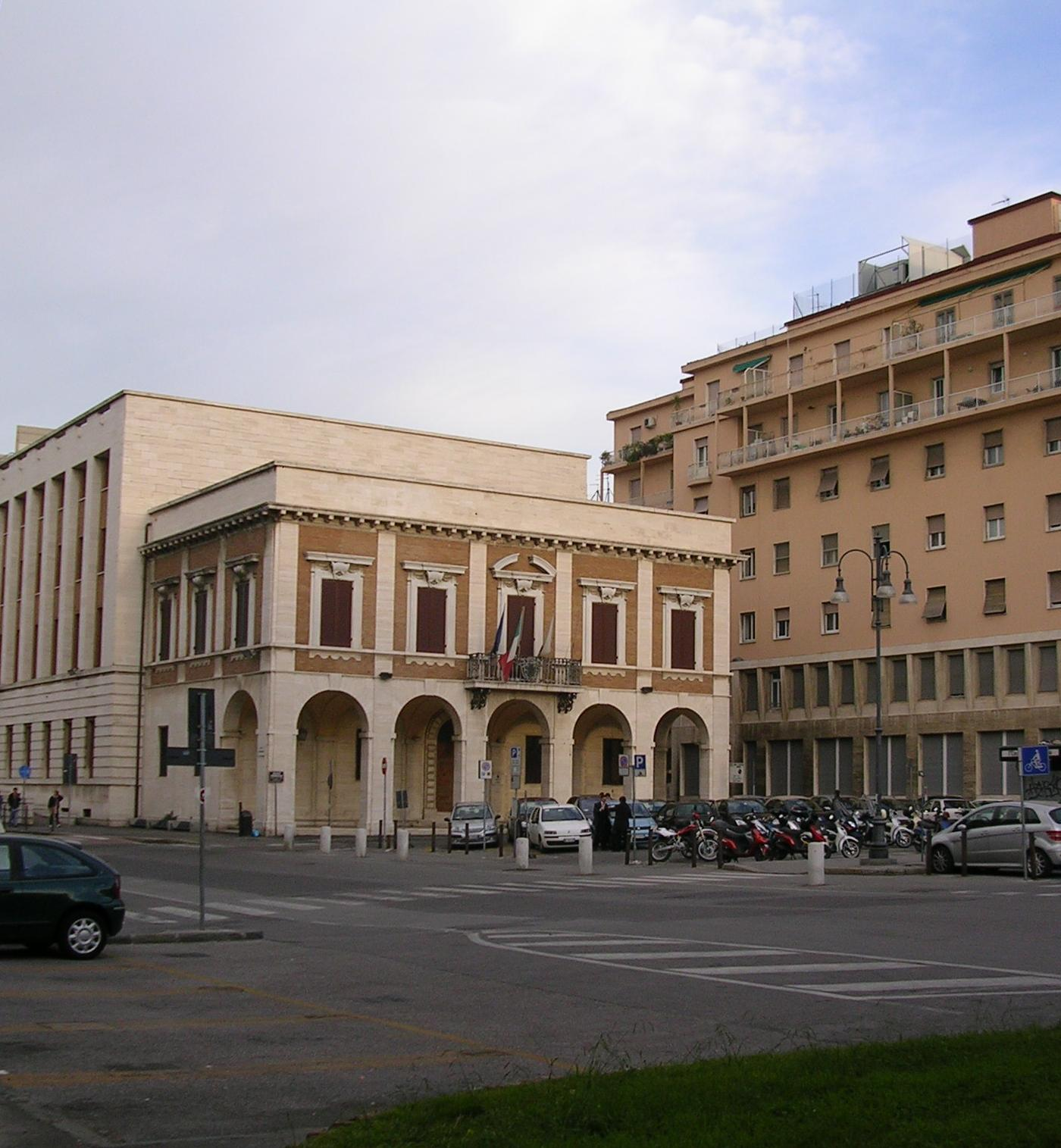 Livorno: il Palazzo Granducale in Piazza del Municipio (un tempo facente parte di Piazza Grande.